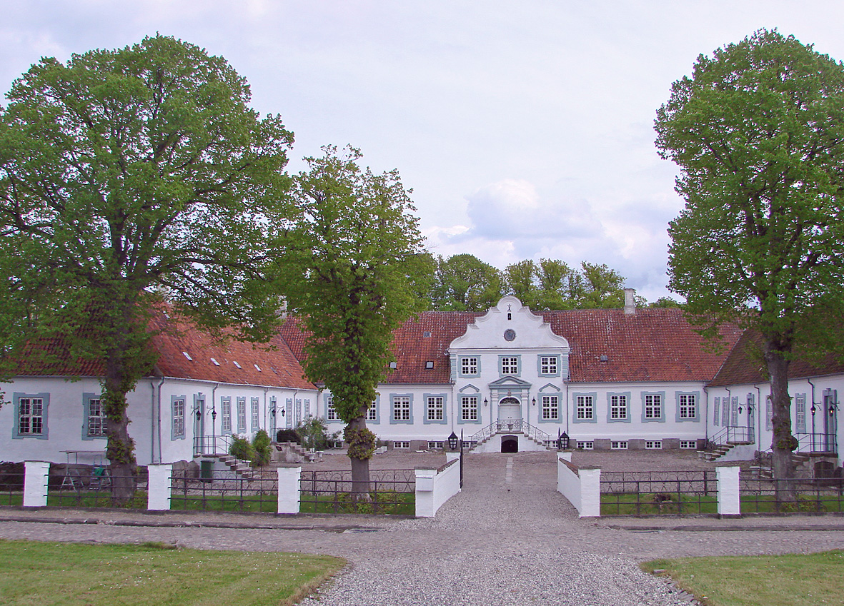 Gjessinggård er en gammel sædegård som ligger i Tvede Sogn, Nørhald Herred, Randers Kommune.